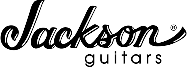 Logo Jackson